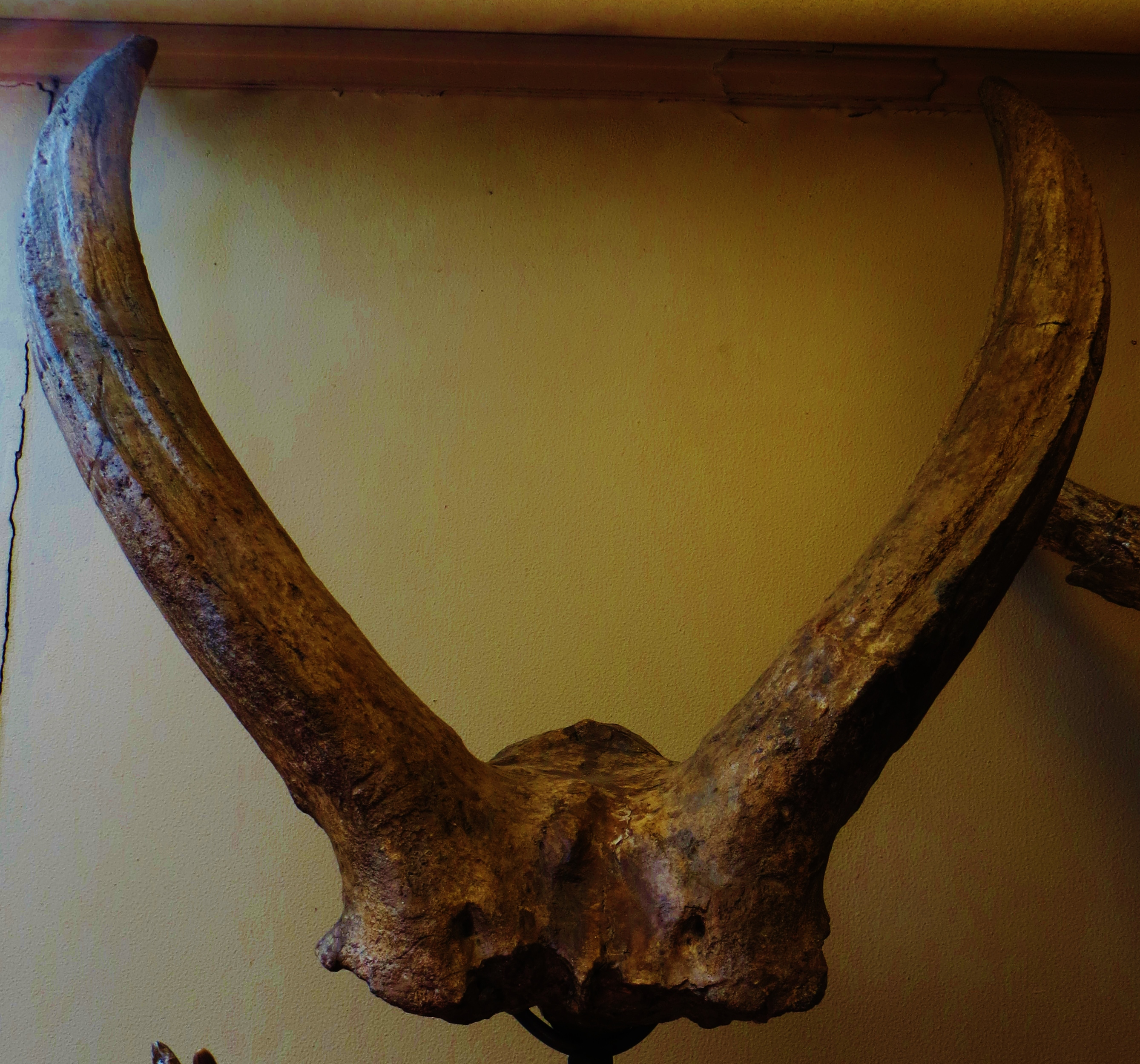 Fossil of Alephis, an extinct mammal - Took the photo at Museum Histoire Naturelle, Paris